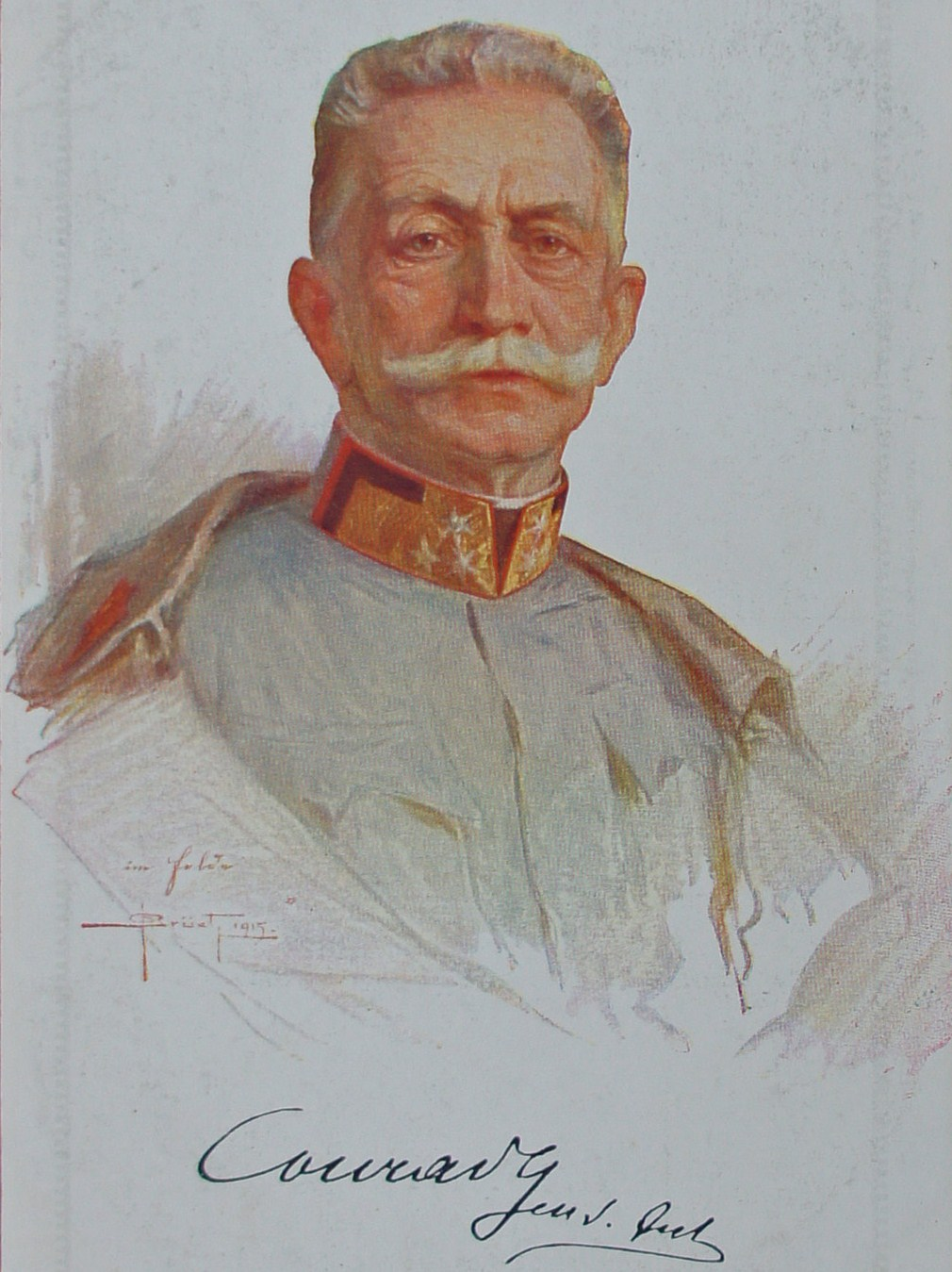 Carte postale expédiée en 1916 de Conrad. Le dessin est peut-être signé Brüet 1915.